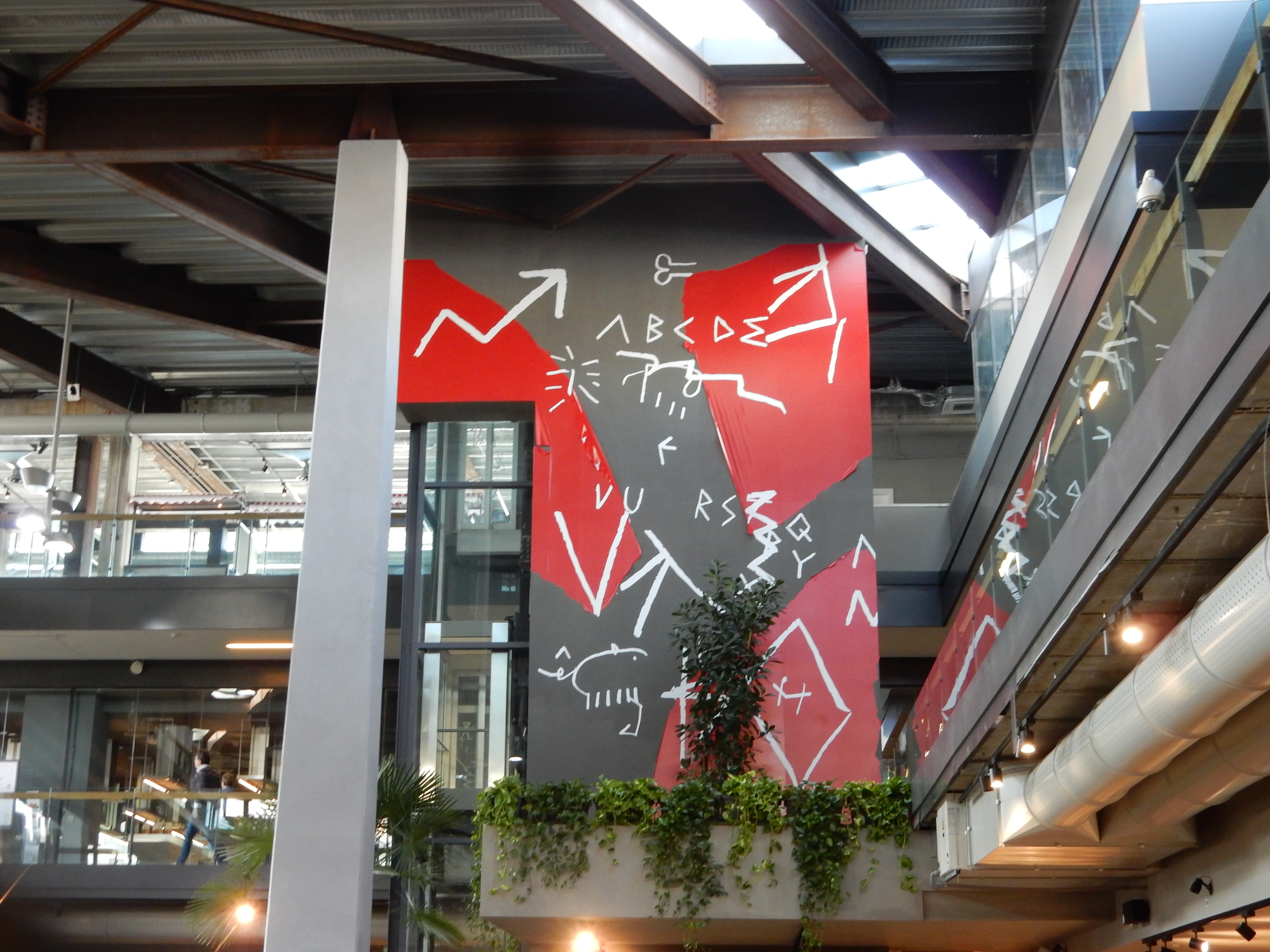 Interni nuovo Mercato Centrale